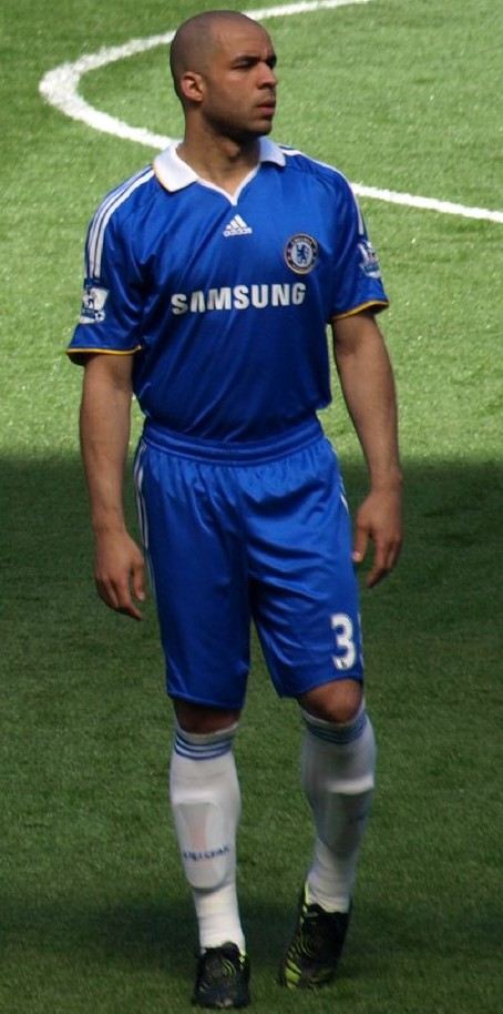 Alex